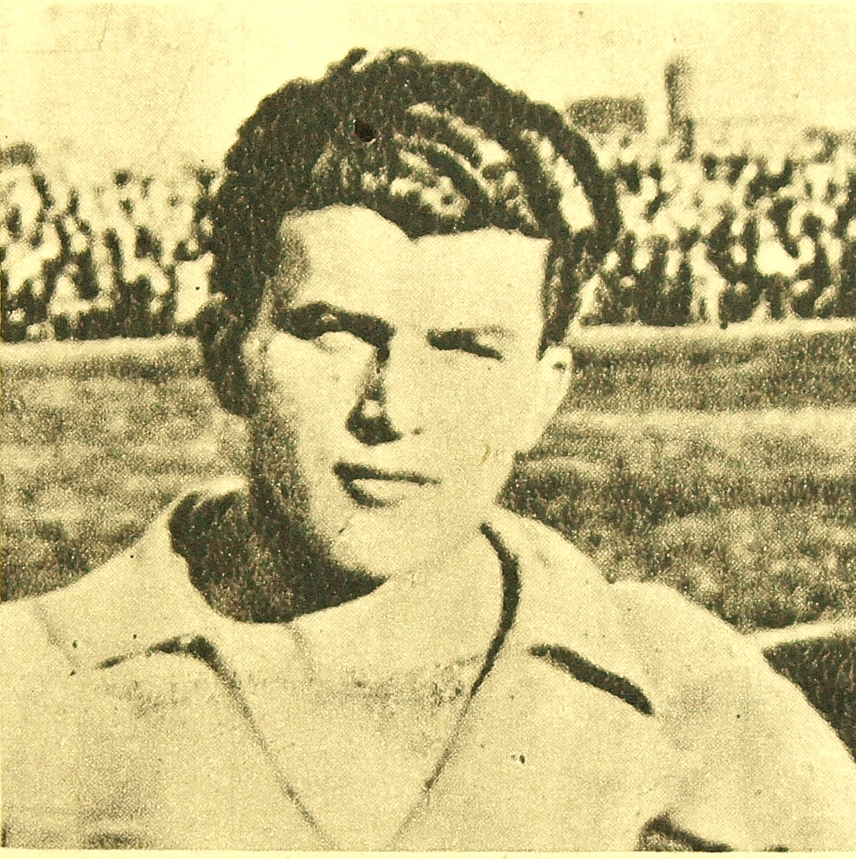 Edmund Giemsa - piłkarz